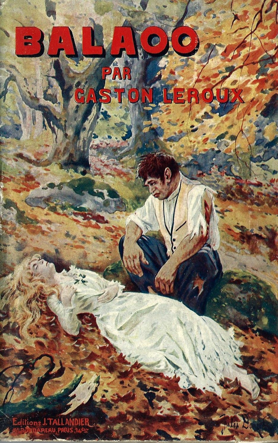 Balaoo, roman de Gaston Leroux, éditions Jules Tallandier 1912. In-12 broché de 368 pages au format 12 x 19 cm. Couverture à rabats illustrée de Chales Donzel.